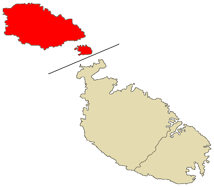 Mapa de la región de Gozo